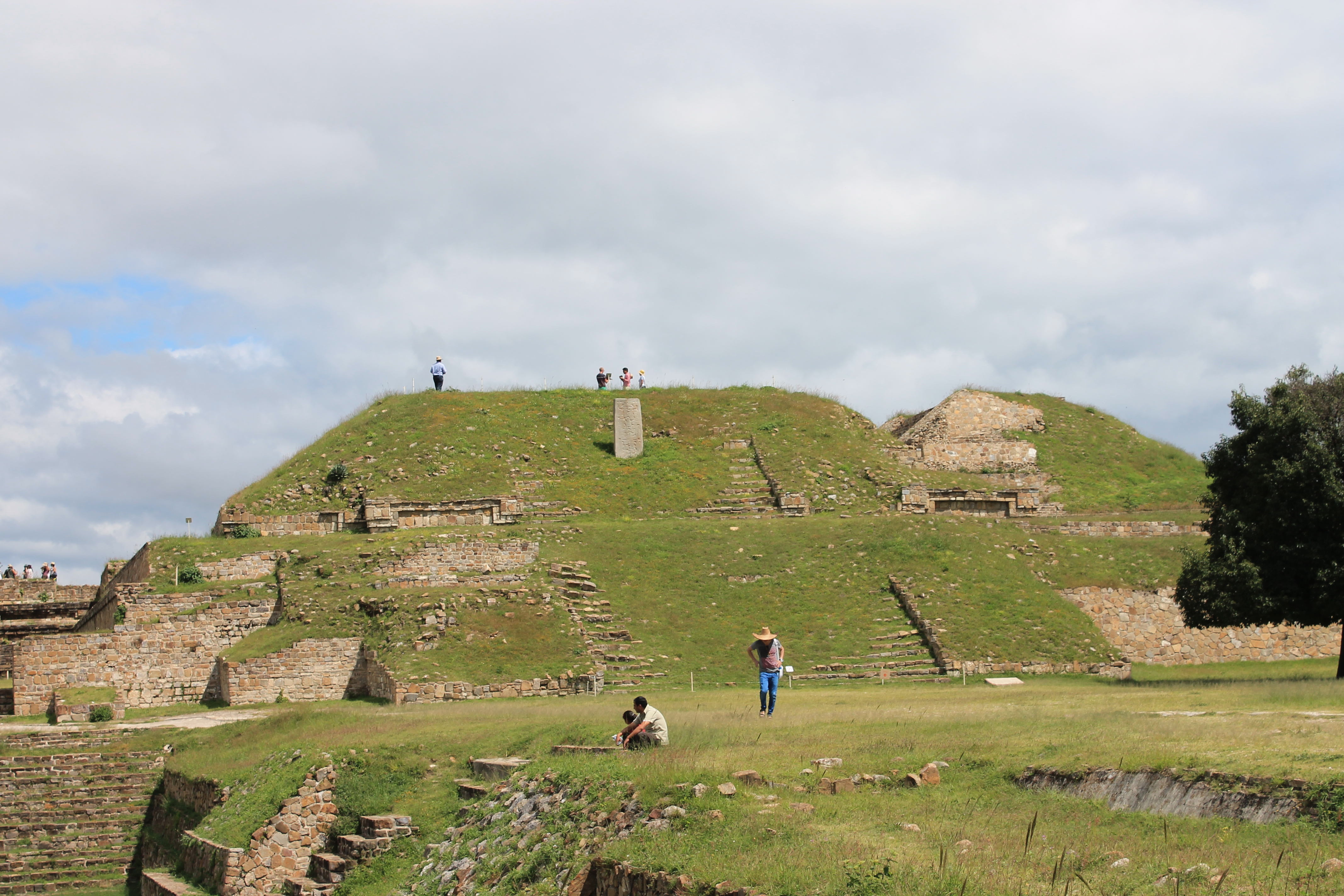 Se muestra el Edificio E, ubicado en la Plataforma Norte de la zona arqueológica Monte Albán, junto al Patio Hundido. Se aprecia una de las estelas de la zona en la parte frontal de la edificación. Al fondo a la derecha se distingue una parte de el Edificio VG.